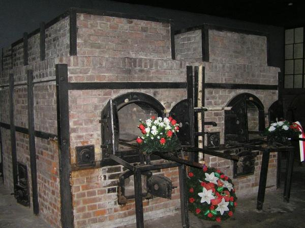 Piec krematoryjny w KL Stutthof